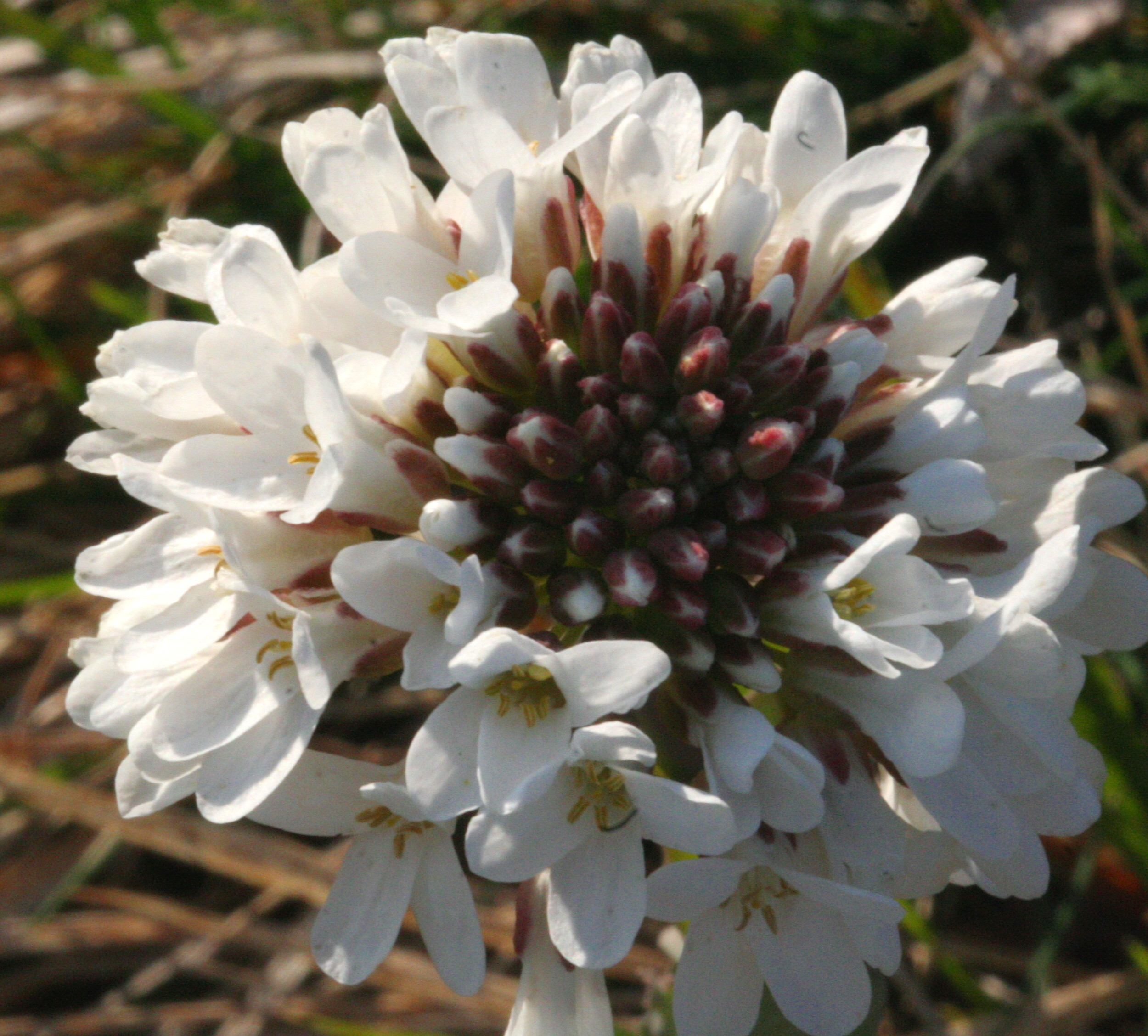 Erba storna montanina - Località : Pellegai, Mel (BL), 503 m s.l.m.